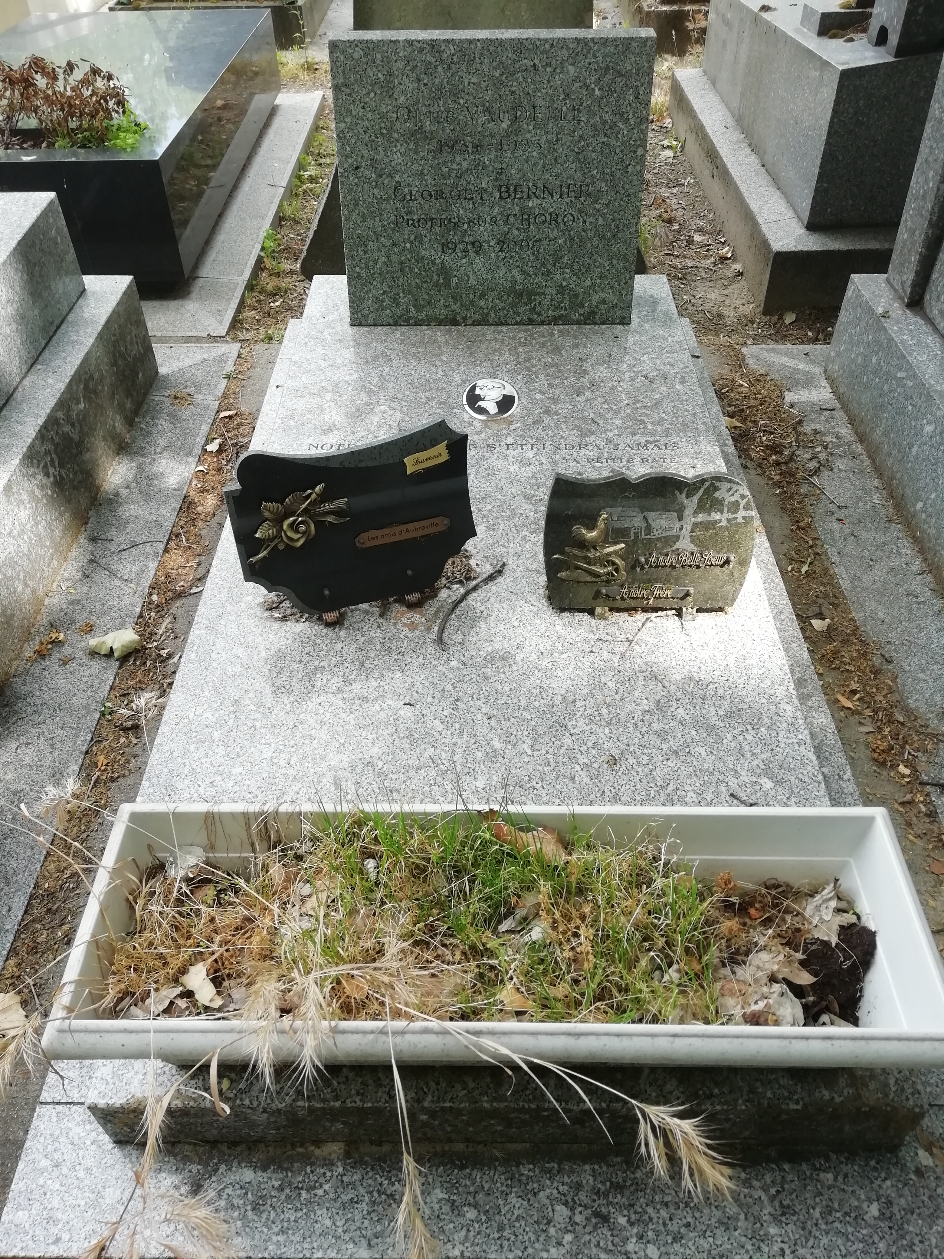 Tombe de Georget Bernier alias Professeur Choron au cimetière du Montparnasse.